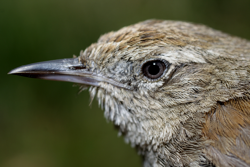 Asthenes perijana Birds of Serranía de Perijá of Colombia and Venezuela (Ornitologia Colombiana [2014] 14: 62–93)